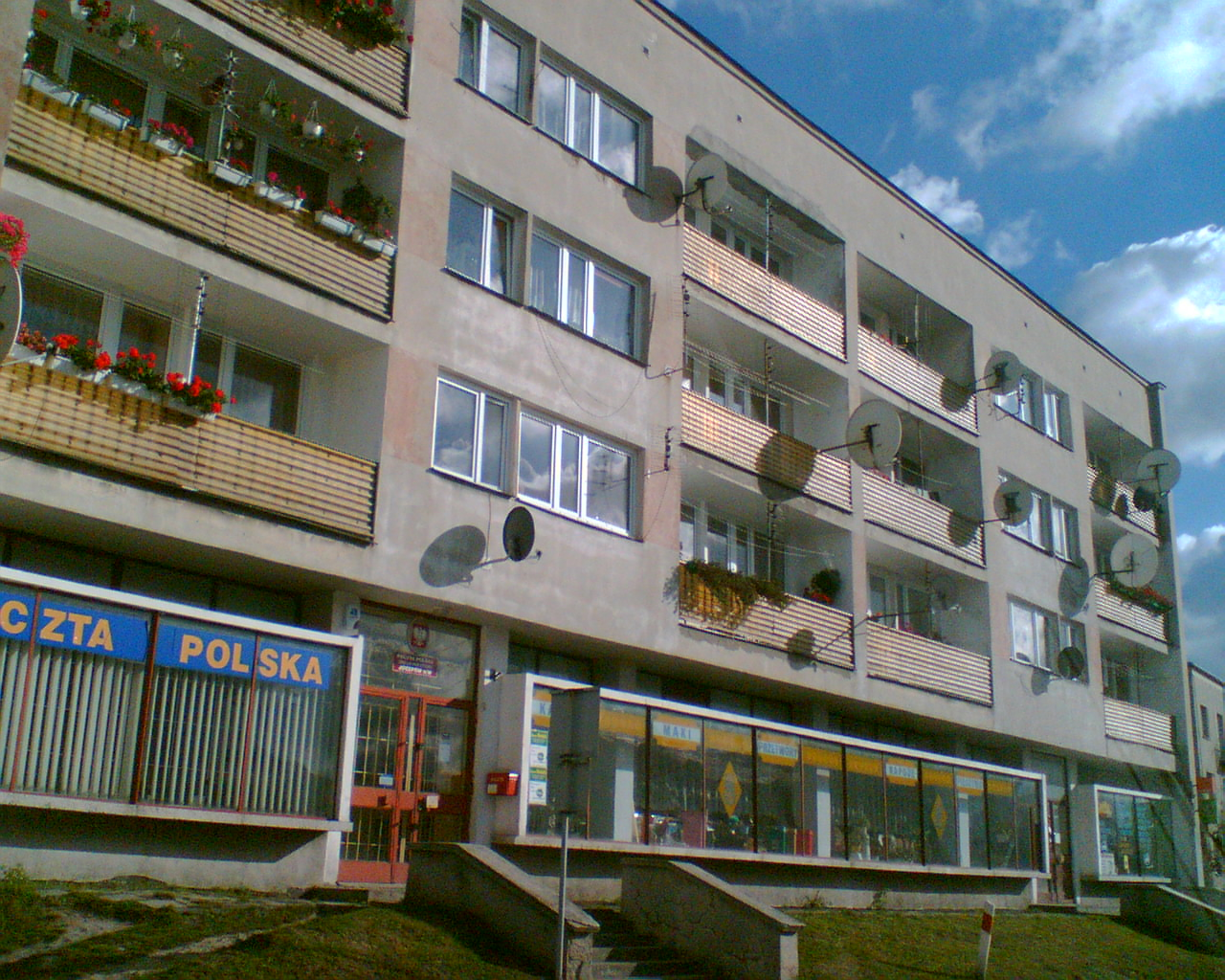 Na rynku w Józefowie nad Wisłą